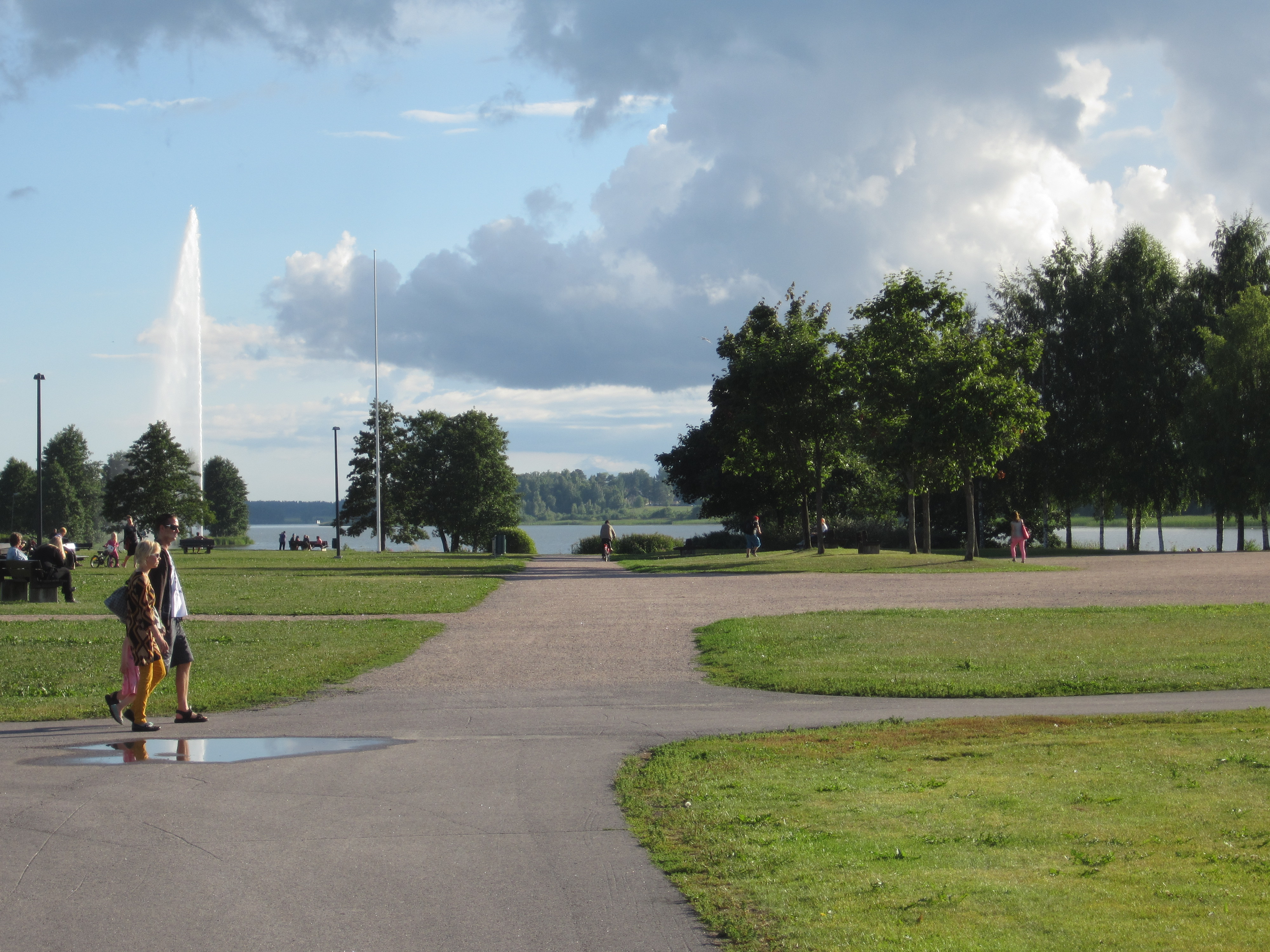 Järvenpään rantapuisto